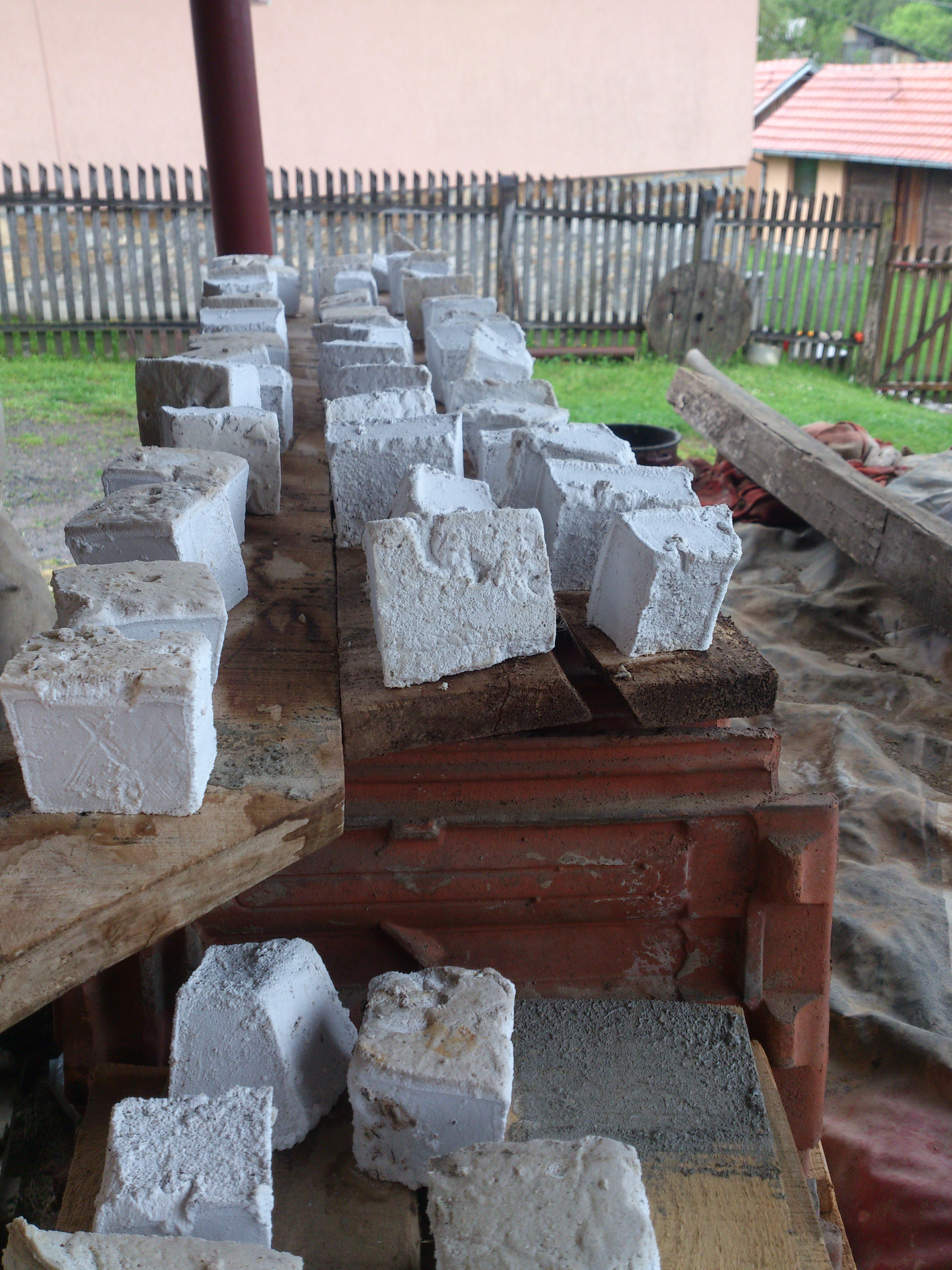 Домаћи сапун и данас се прави у појединим домаћинствима. Можда није мирисан као онај из продавнице, али је вероватно здравији.